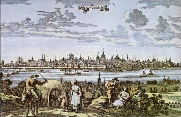 Blick von Deutz auf die Stadt - Köln